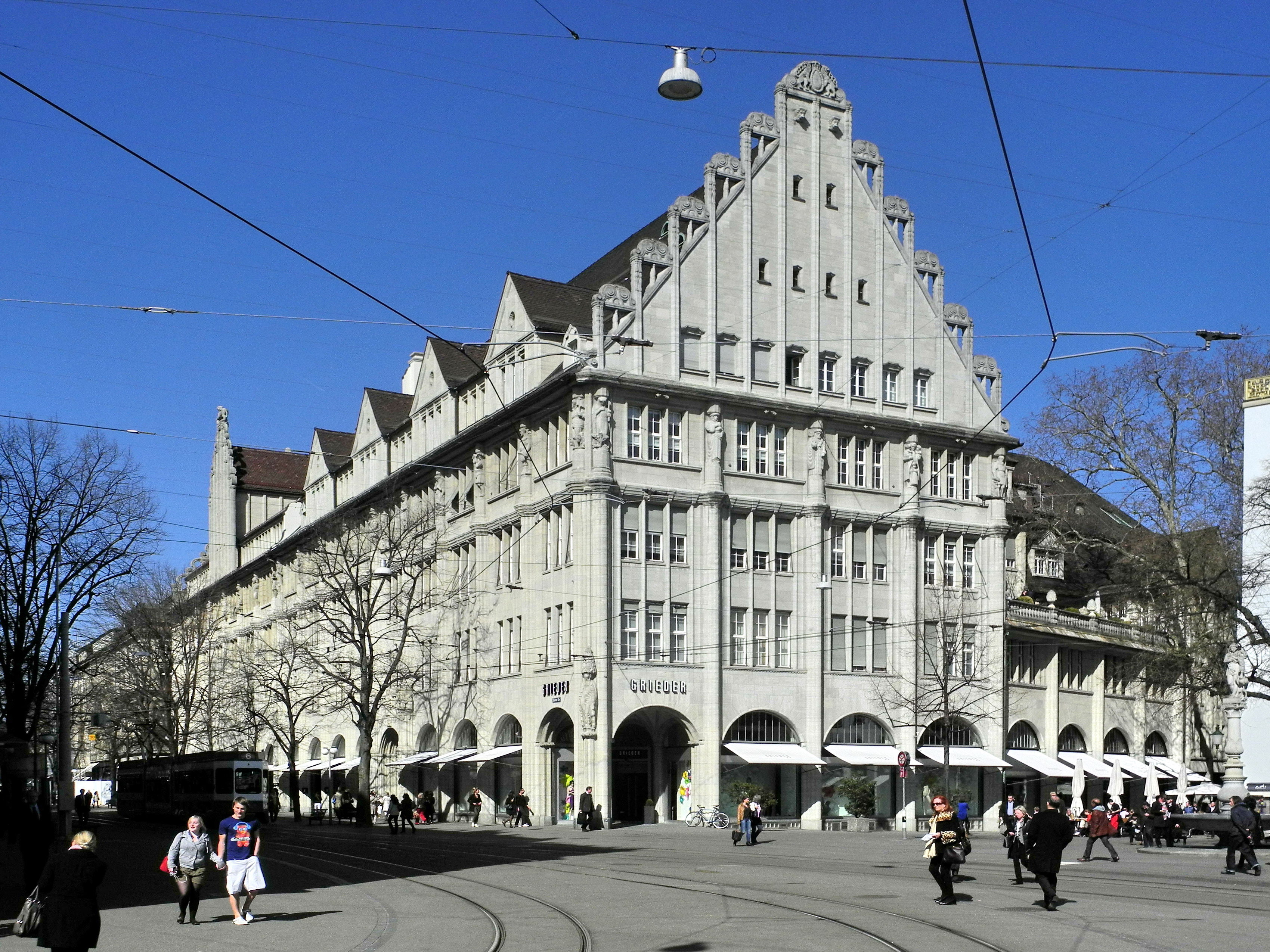 Peterhof-Leuenhof, Paradeplatz - Bahnhofstrasse in Zürich (Switzerland)